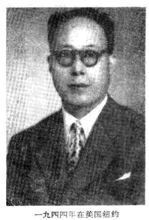 中文（台灣）: 楊鍾健院士